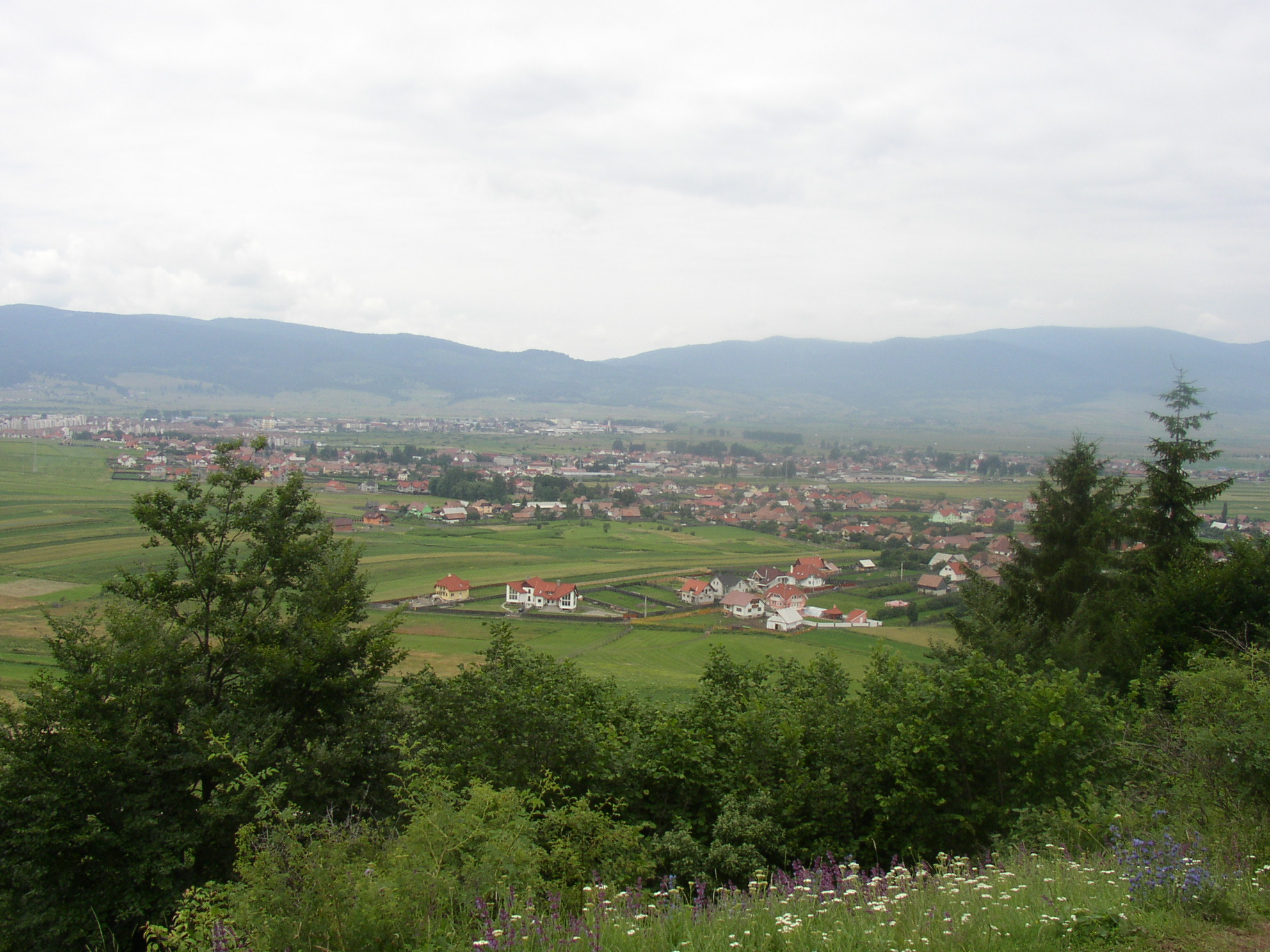 Miercurea Ciuc, Csíkszereda, Erdely, Hargita, Romania